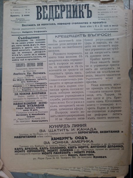 Вестник "Ведерник"